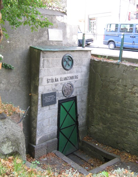 Banská Štiavnica, štôlňa Glanzenberg